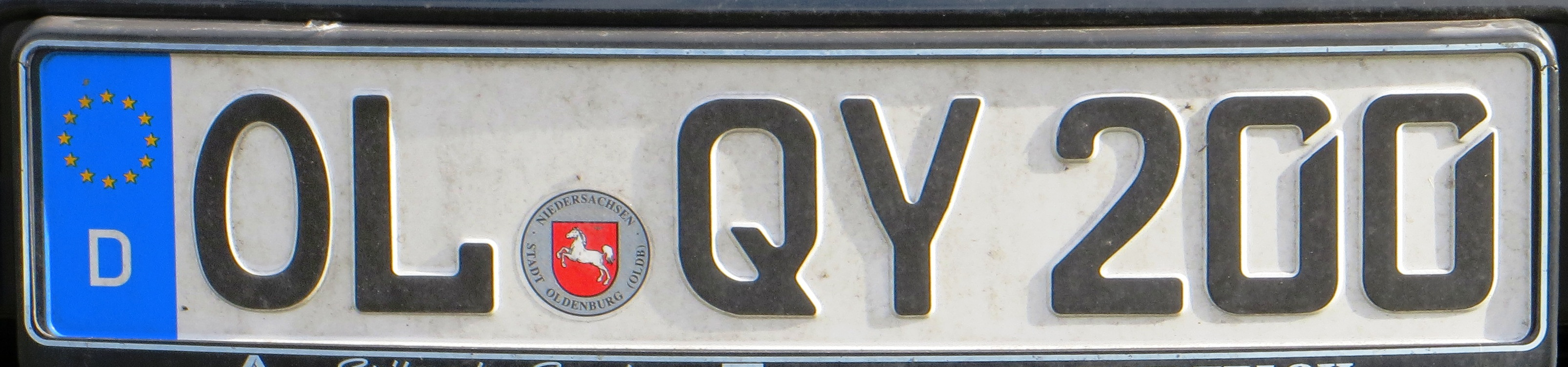 Oldenburg kentekenplaat Niedersachsen